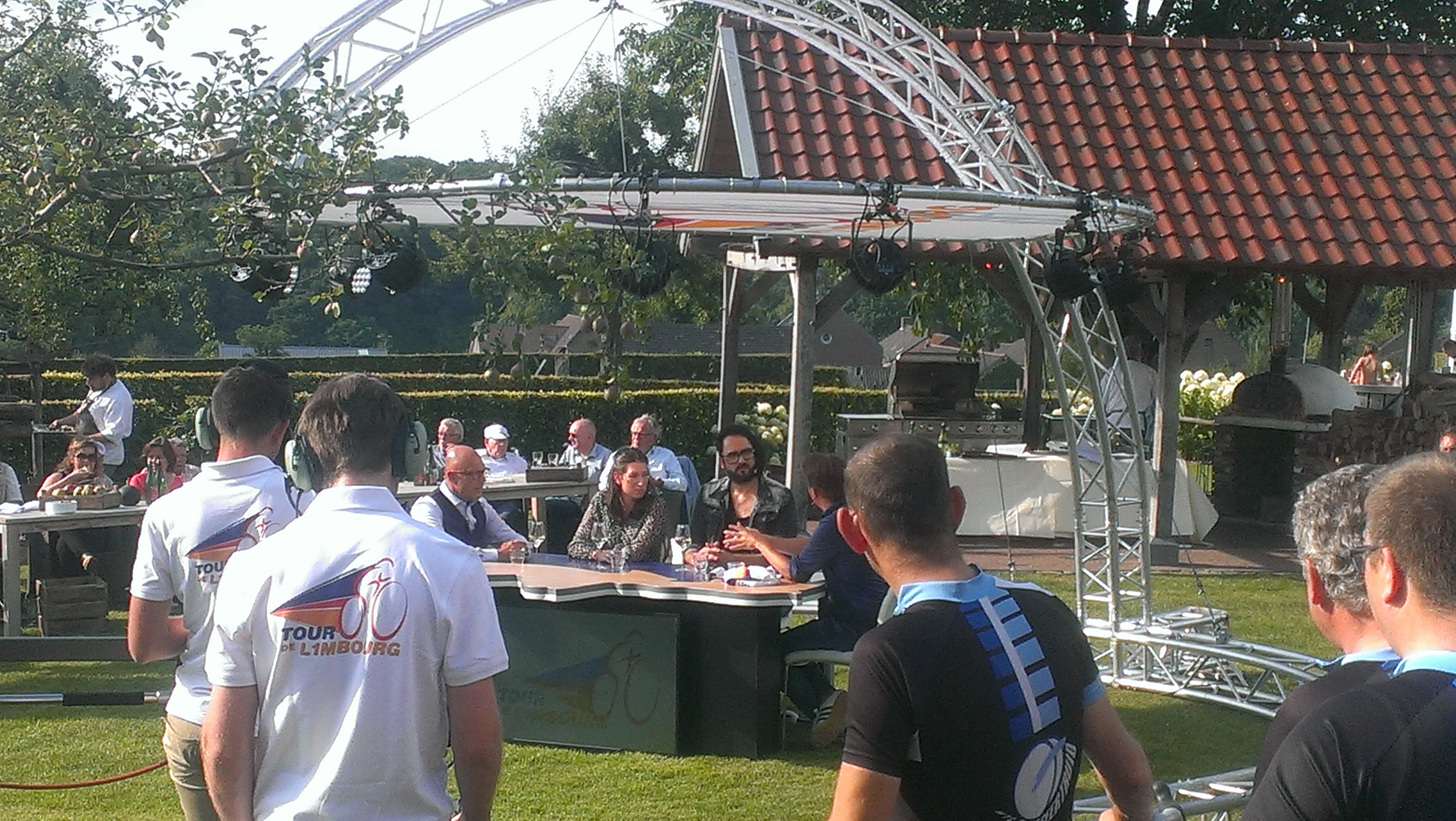 Tour de L1mbourg in Moerslag, 12 juli 2018